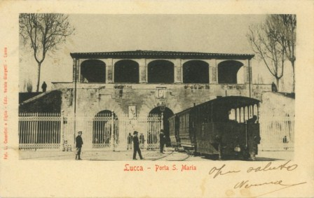 Lucca, tram per Ponte a Moriano in uscita dalla Porta S. Maria